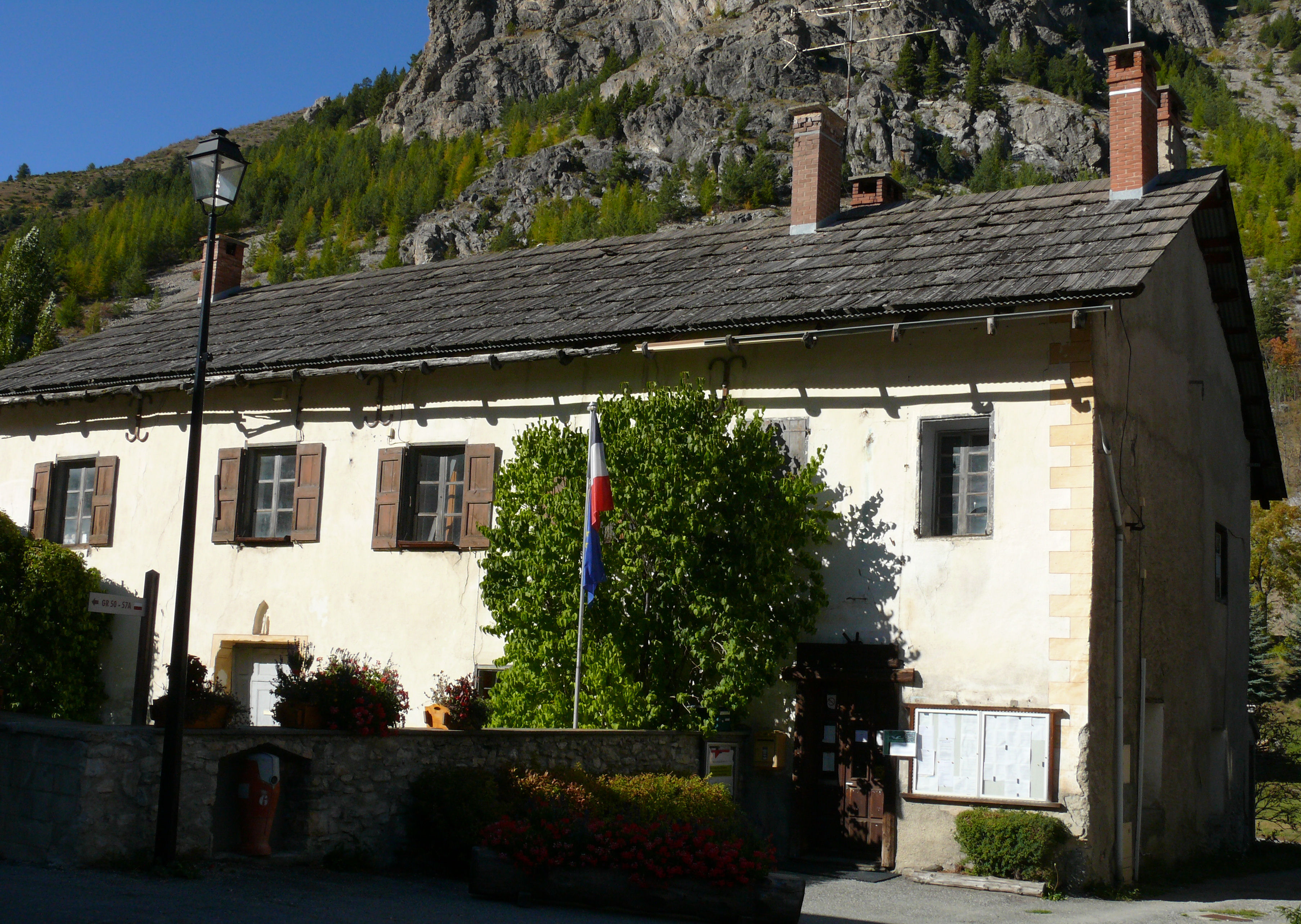 Névache - Ville Haute - Mairie